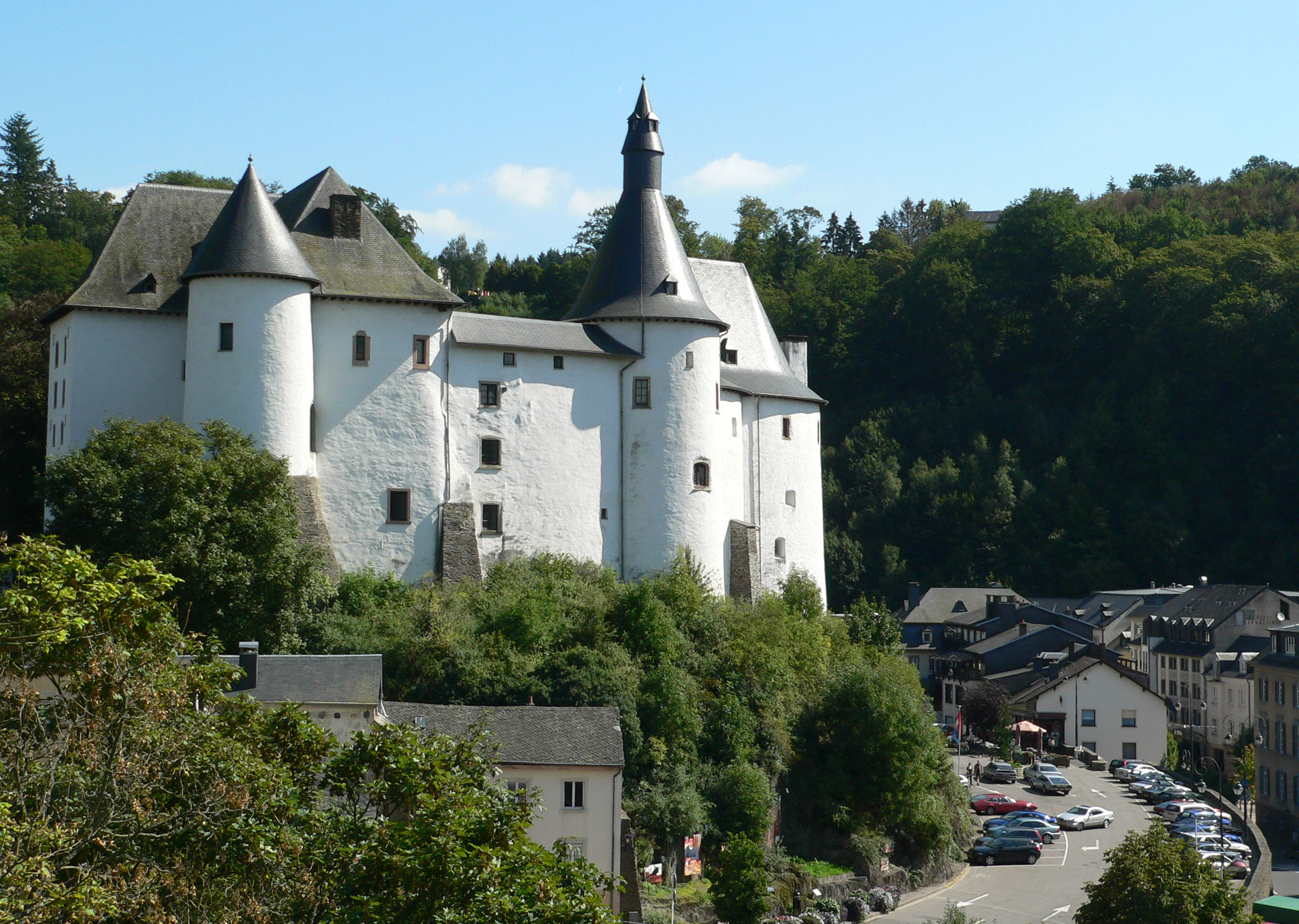 Schlossburg in Clerf (fr.: Clervaux) Luxemburg, von der Pfarrkirche aus